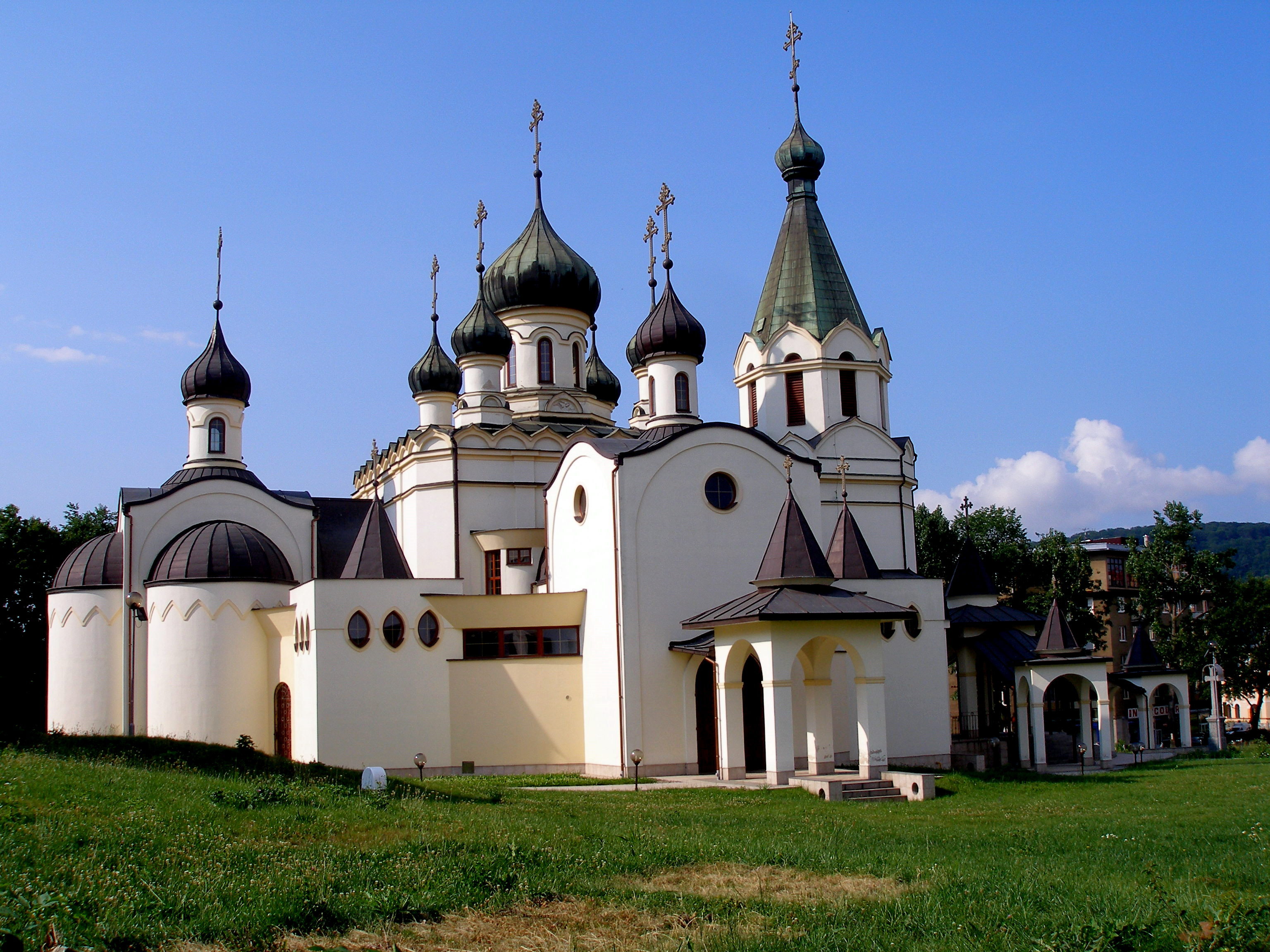 Prešov, Katedrálny chrám sv. kniežaťa A.Nevského